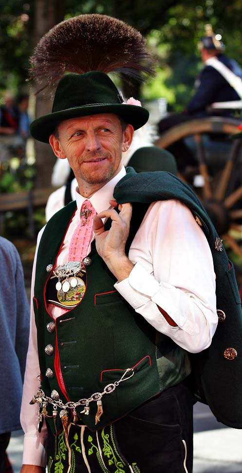 Miesbacher Gebirgstracht, Oktoberfesteinzug München, Oktober 2004